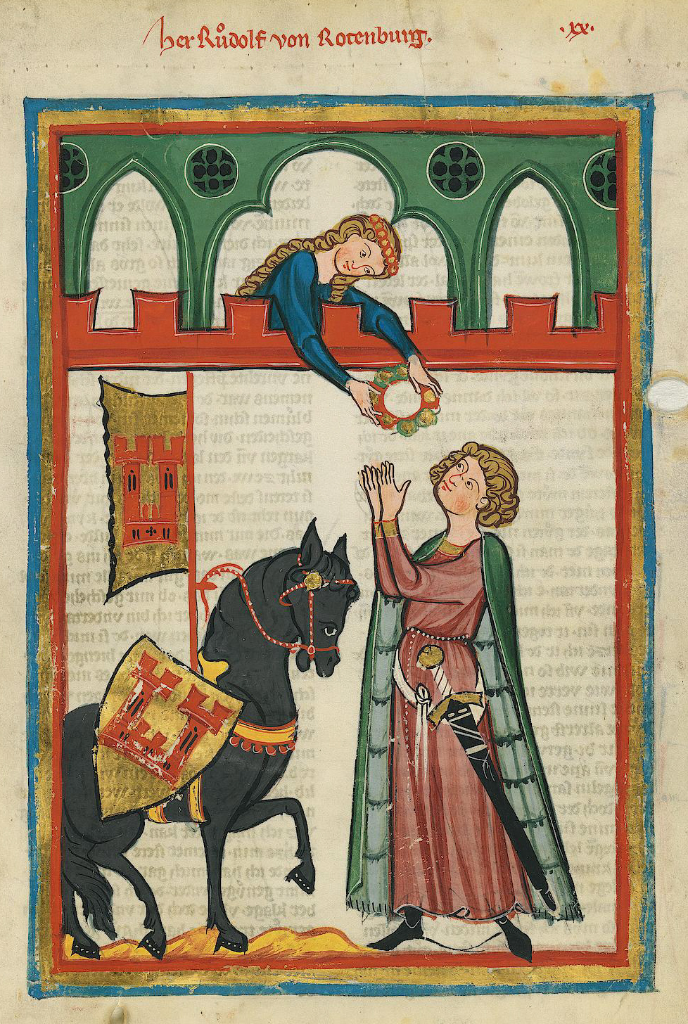 Codex Manesse, fol. 54r. Der urkundlich 1257 bezeugte Rudolf von Rotenburg gehörte einem nördlich von Luzern ansässigen Ministerialengeschlecht an, das in den Diensten der Vögte von Rotenburg stand. Auf der Miniatur empfängt er aus den Händen seiner Dame einen Kranz.